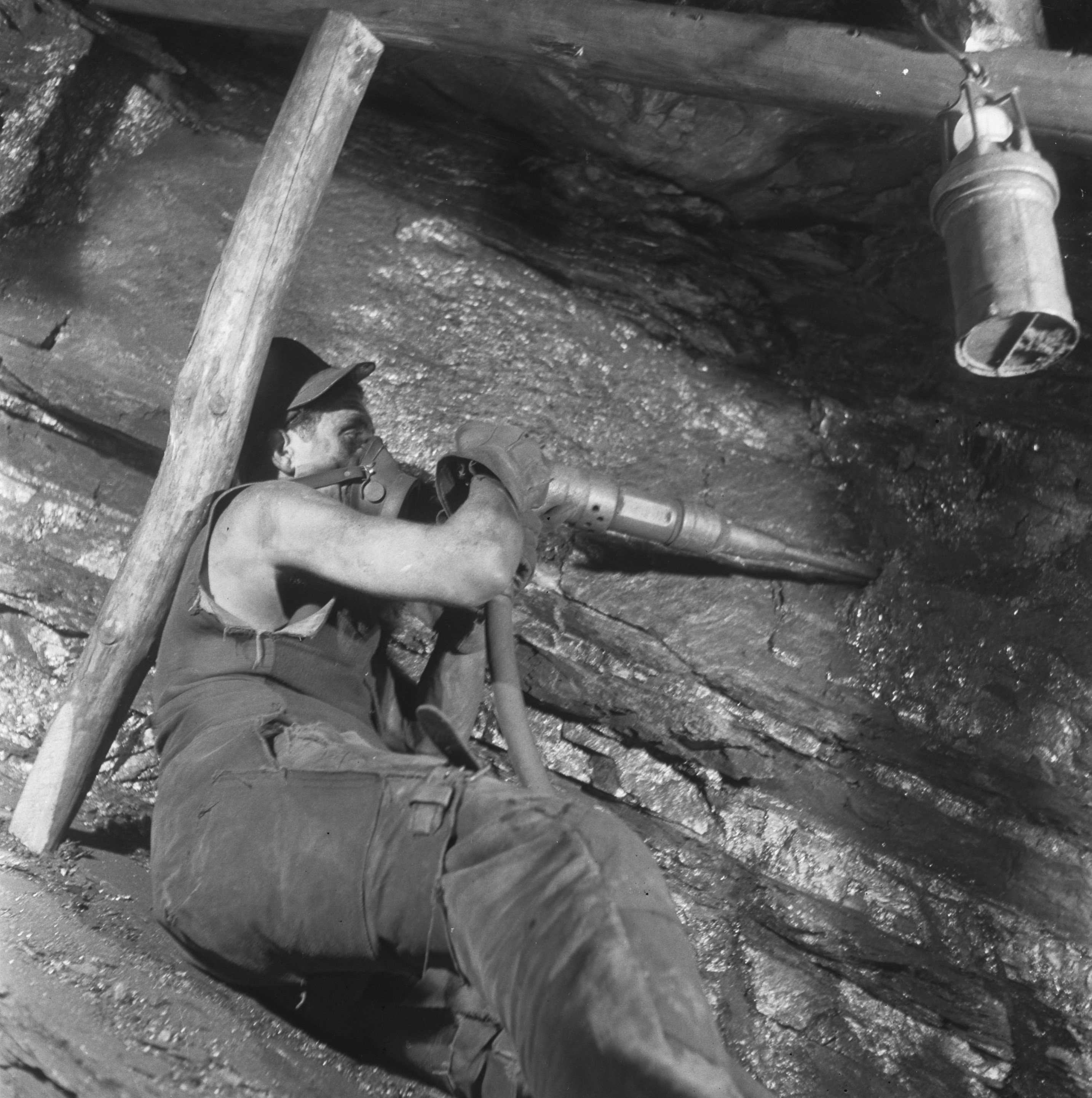 Collectie / Archief : Fotocollectie Anefo Reportage / Serie : Kolenmijnen Limburg Beschrijving : Kolenmijnen Limburg Datum : 21 november 1945 Locatie : Limburg Trefwoorden : mijnbouw, mijnen, mijnwerkers Fotograaf : Taconis, Kryn / Anefo Auteursrechthebbende : Nationaal Archief Materiaalsoort : Negatief (zwart/wit) Nummer archiefinventaris : bekijk toegang 2.24.01.03 Bestanddeelnummer : 901-1069